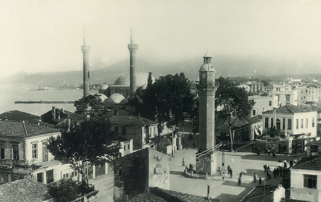 Saathane Meydanı'nın cumhuriyetin ilk yıllarında bir görünümü. Deniz henüz doldurulmamış.